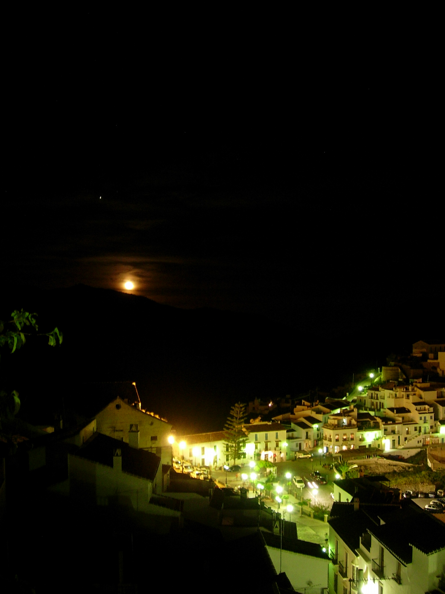 Frigiliana Vista panoramica nocturna